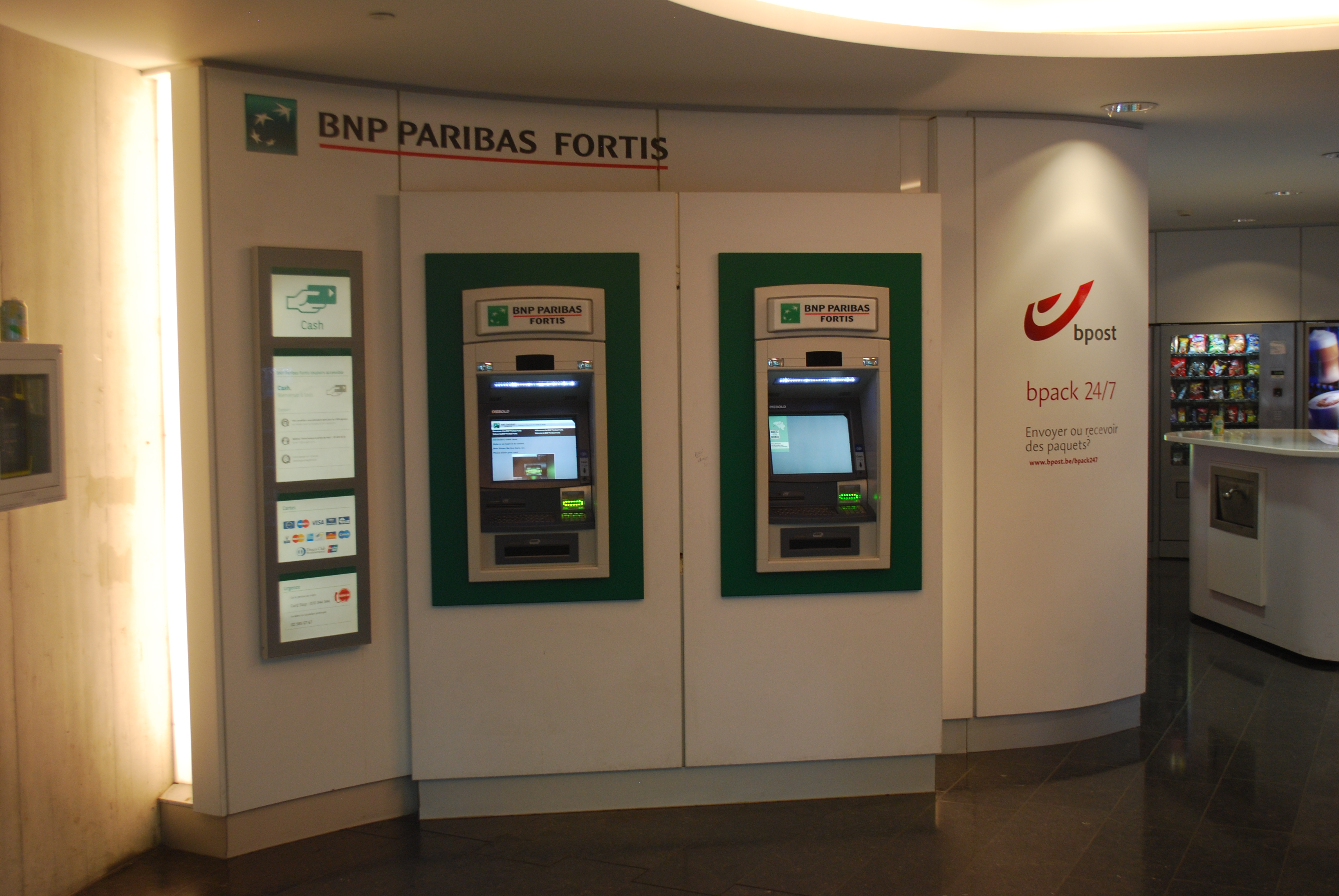 Vue du quartier de Fragnée-Guillemins à Liège.